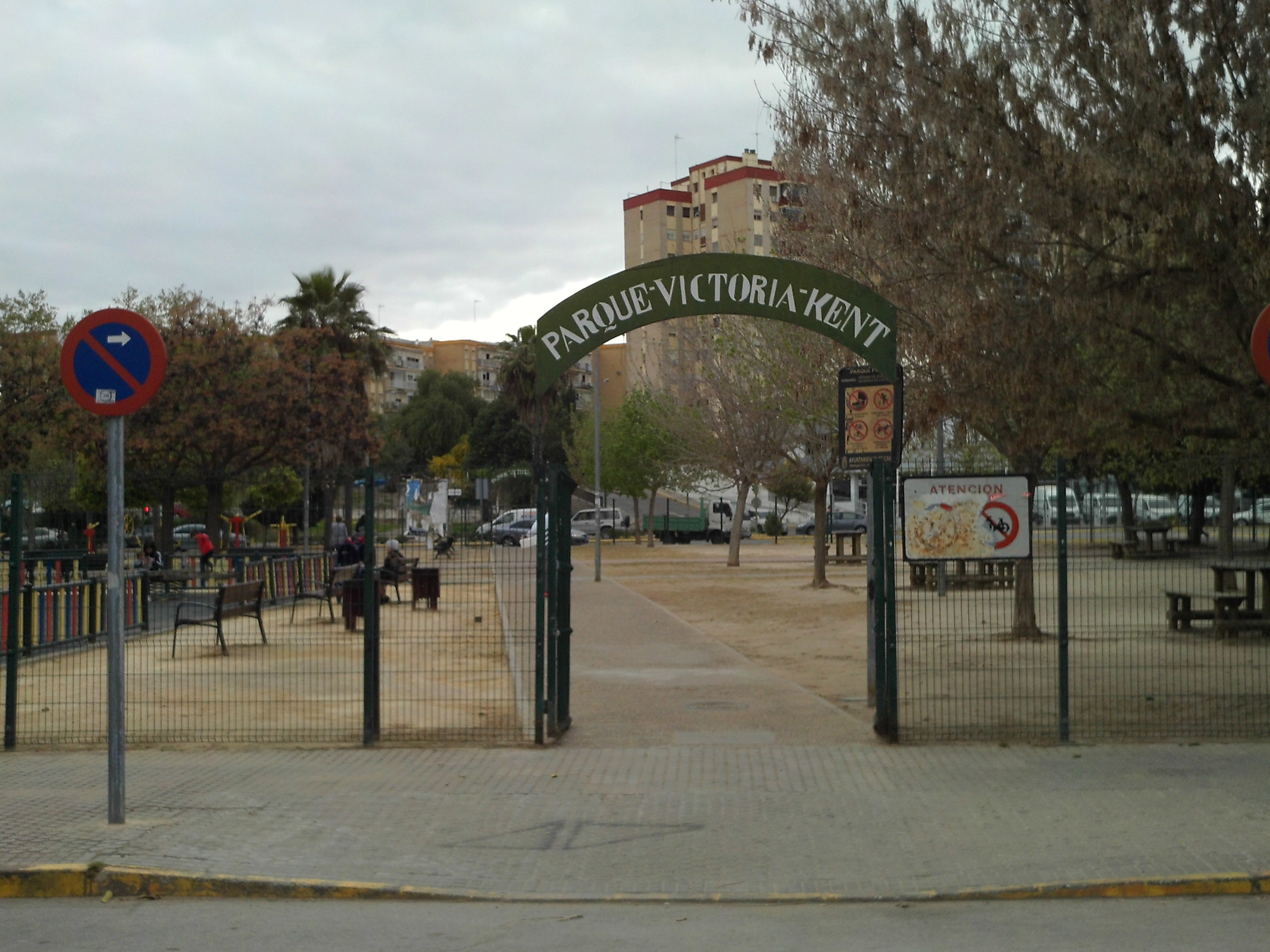 Parque Victoria Kent. Camas, provincia de Sevilla, Andalucía, España.